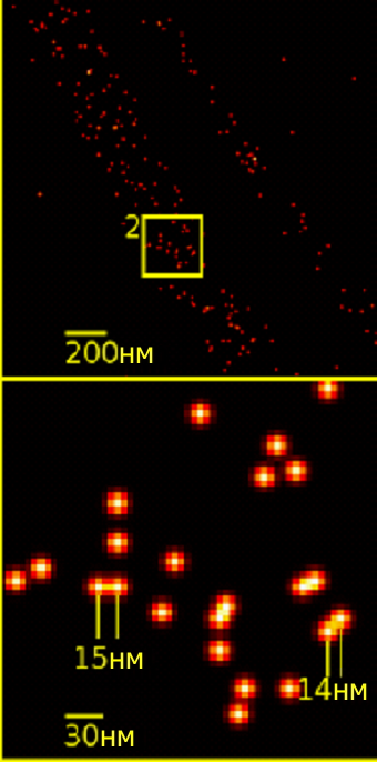 Микроскопия суперразрешения/оптическая наноскопия с использованием SPDMphymod в качестве новой методики локальной микроскопии для стандартных флуоресцентных красителей.